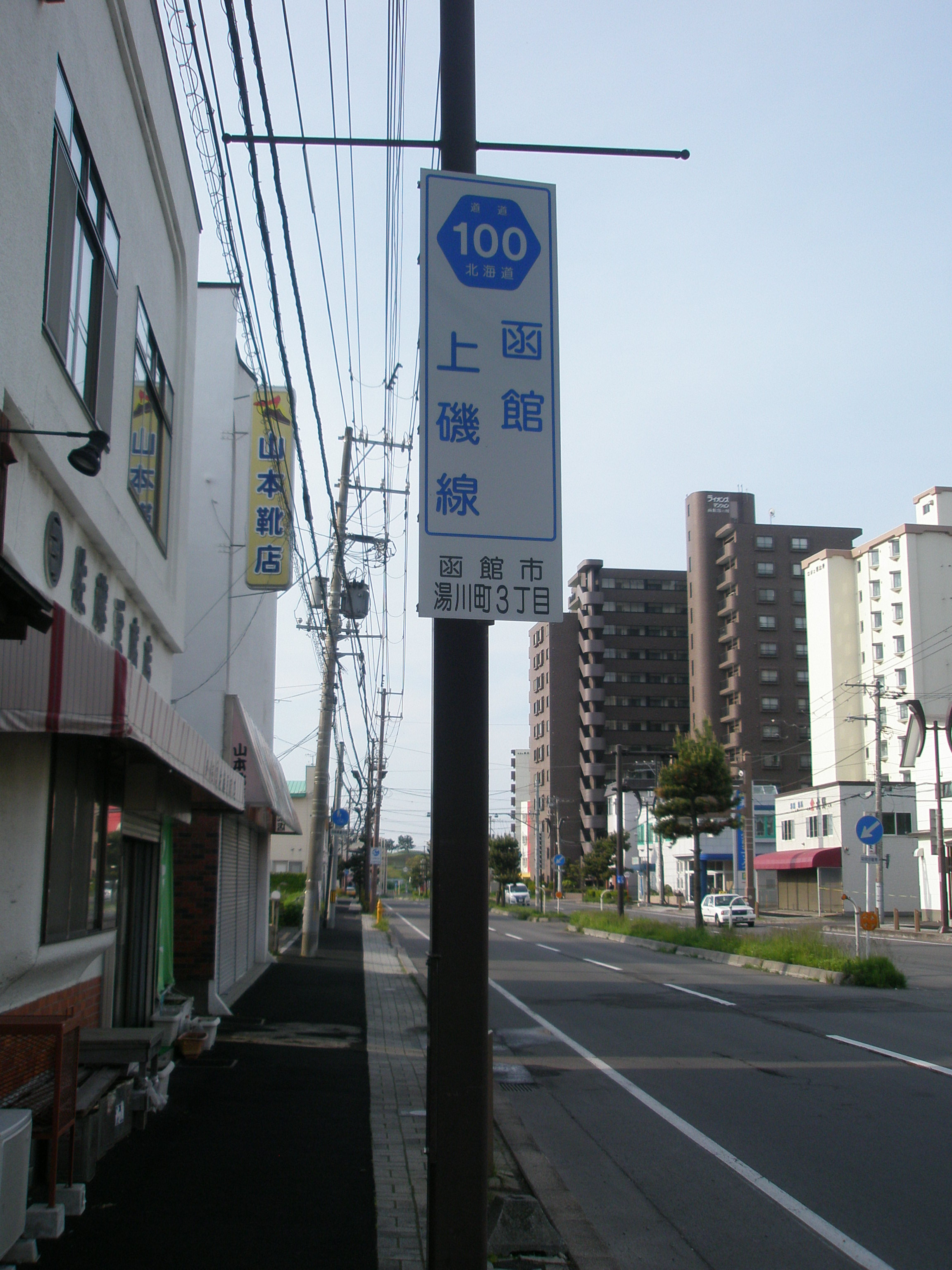 北海道道100号函館上磯線・北海道道83号函館南茅部線交点（湯川町3丁目）付近に設置の道道番号標識